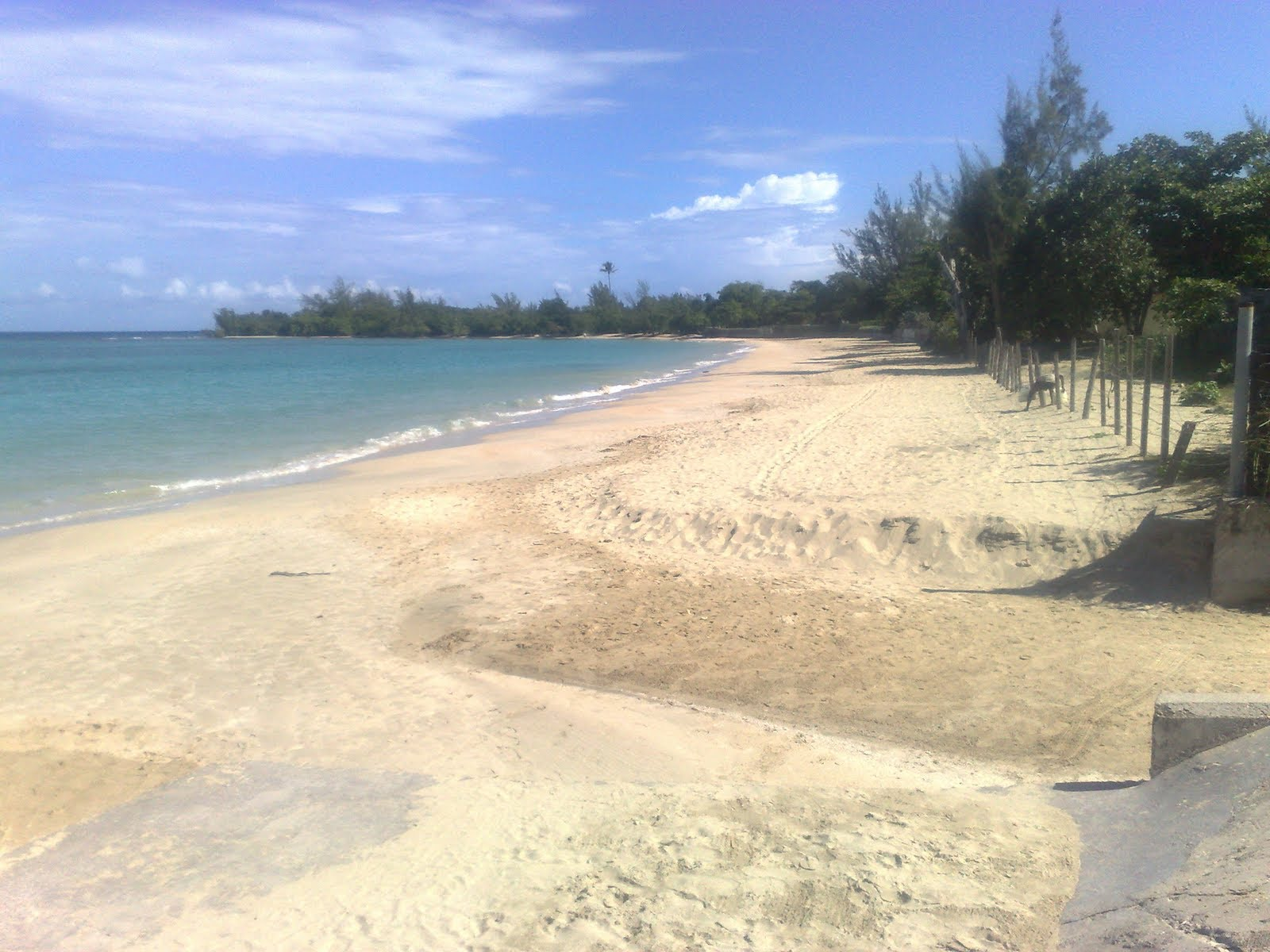 Sandstrand in Runaway Bay